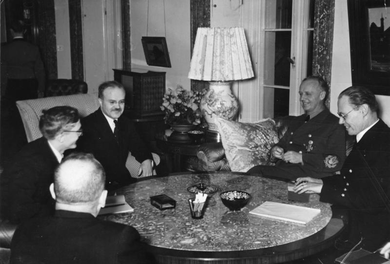 Berlin, Molotow im Auswärtigen Amt Scherl-Bildtext: Aussenkommissar W.M. Molotow in Berlin - Empfang durch den Reichsminister v. Ribbentrop im Auswärtigen Amt Eine Stunde nach seiner Ankunft wurde heute Dienstag, den 12.11.40, 12 Uhr, der russische Volkskommissar für auswärtige Angelegenheiten W.M. Molotow im Auswärtigen Amt durch Minister v. Ribbentrop empfangen ADN-Bildtext: Im faschistischen Deutschland 1933-45 Der Vorsitzende des Rates der Volkskommissare und Volkskommissar für Auswärtige Angelegenheiten der UdSSR, W.M Molotow (3.v.r.) wird am 12.11.1940 mittags um 12 Uhr, eine Stunde nach seinem Eintreffen in Berlin, durch Reichsminister Joachim von Ribbentrop im Auswärtigen Amt empfangen 10008-40 Abgebildete Personen: Molotow, Wjatscheslaw Michailowitsch: Außenminister, Sowjetunion (GND 11873461X) Ribbentrop, Joachim von: Außenminister, NSDAP, Deutschland